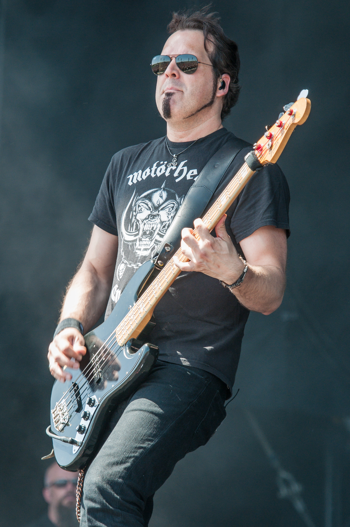 ARGO-Konzerte,Centerstage,Konzert,Livekonzert,Livemusik,Mark Damon,Musik,RiP,Rock im Park 2014,The Pretty Reckless